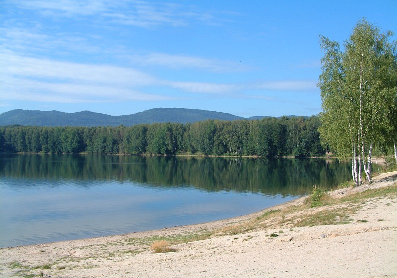 Kristýna lake near Hrádek nad Nisou, Czech Republic